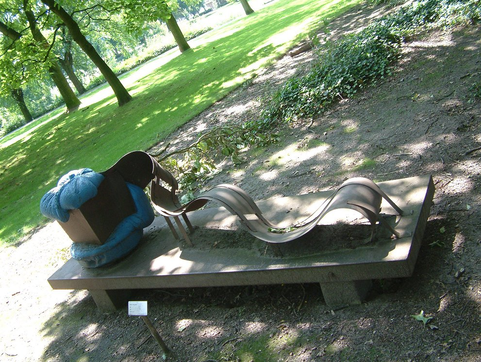 Beeld in het Stadswandelpark in Eindhoven.